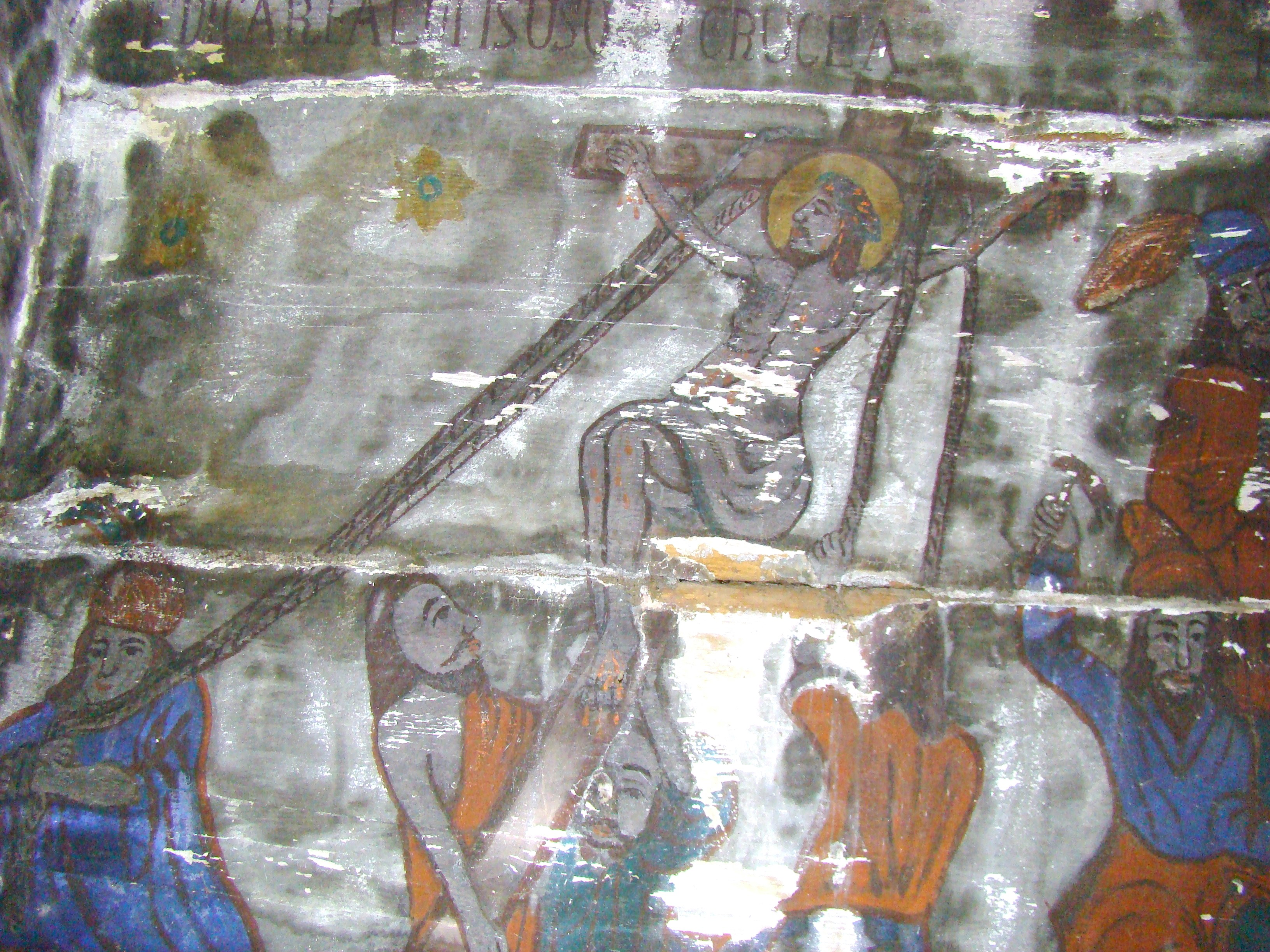 Ridicarea lui Iisus cu Crucea (detaliu). Biserica de lemn "Sfinții Arhangheli Mihail şi Gavriil, sat CALNA; comuna VAD, județul Cluj